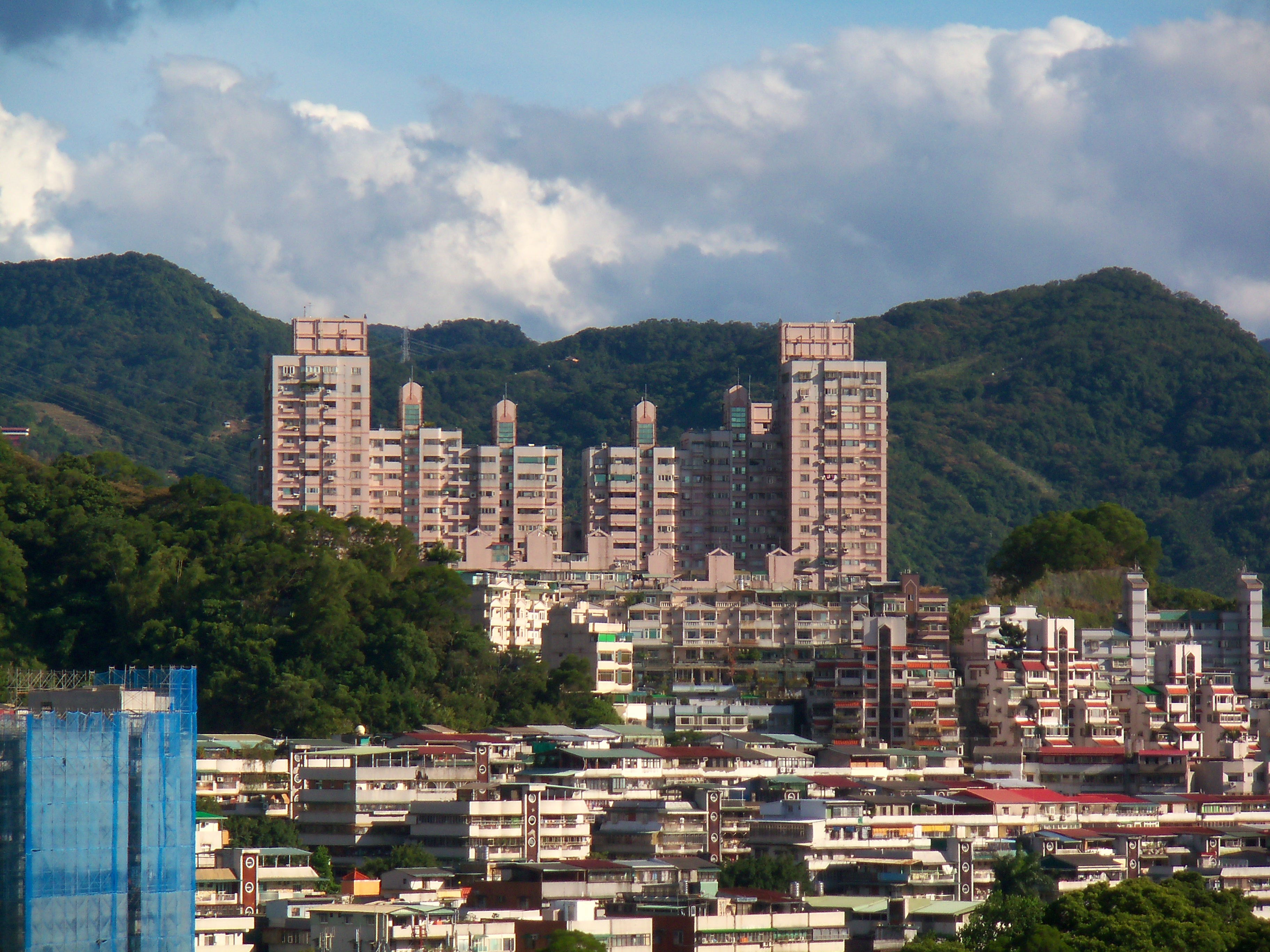 中文（台灣）: 從臺北捷運文山線萬芳醫院站附近的高樓，東南望臺北市文山區興隆山山麓（興隆路三段185巷、207巷）的公寓與豪宅。